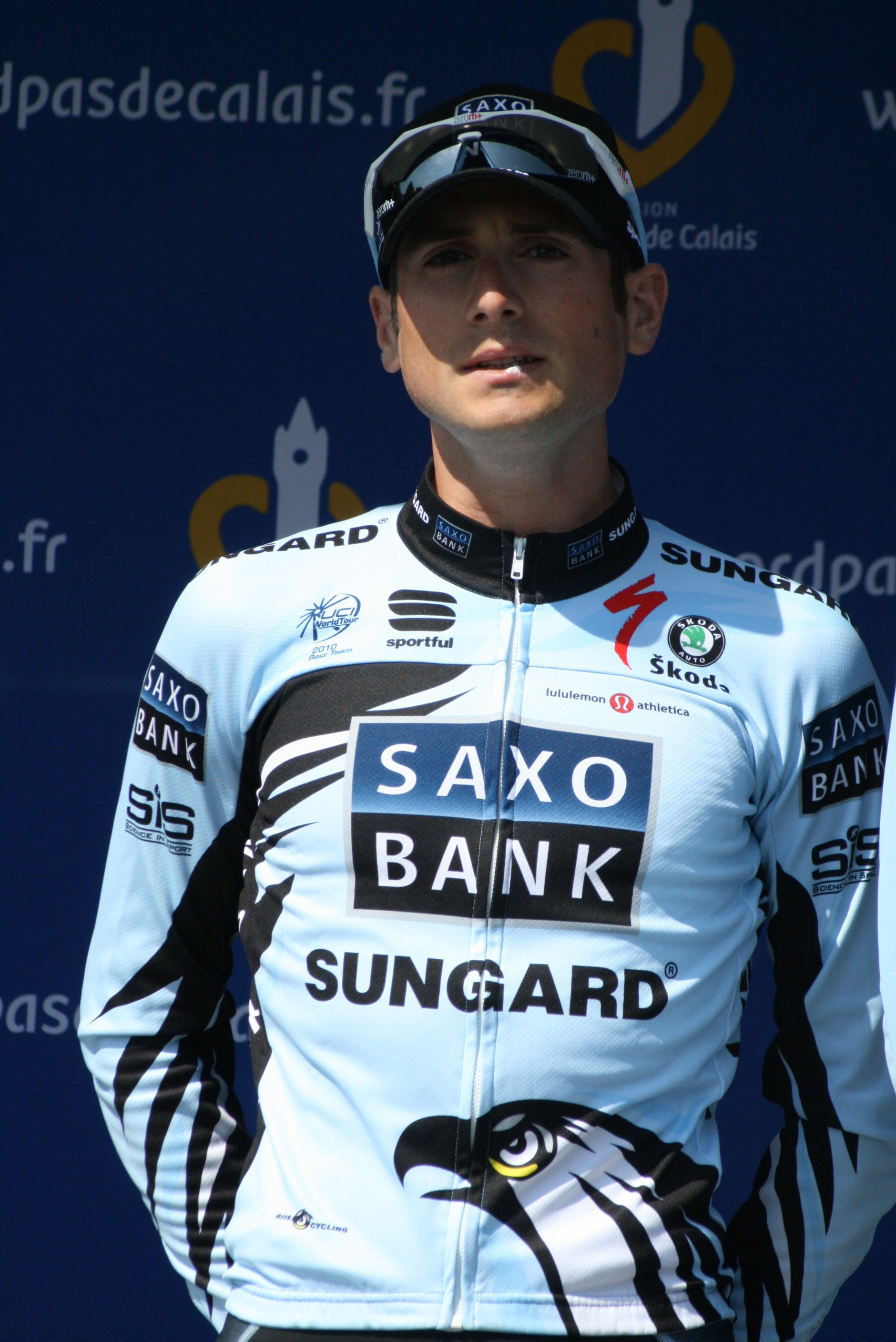 Présentation des coureurs au départ de la première étape Manuele Boaro